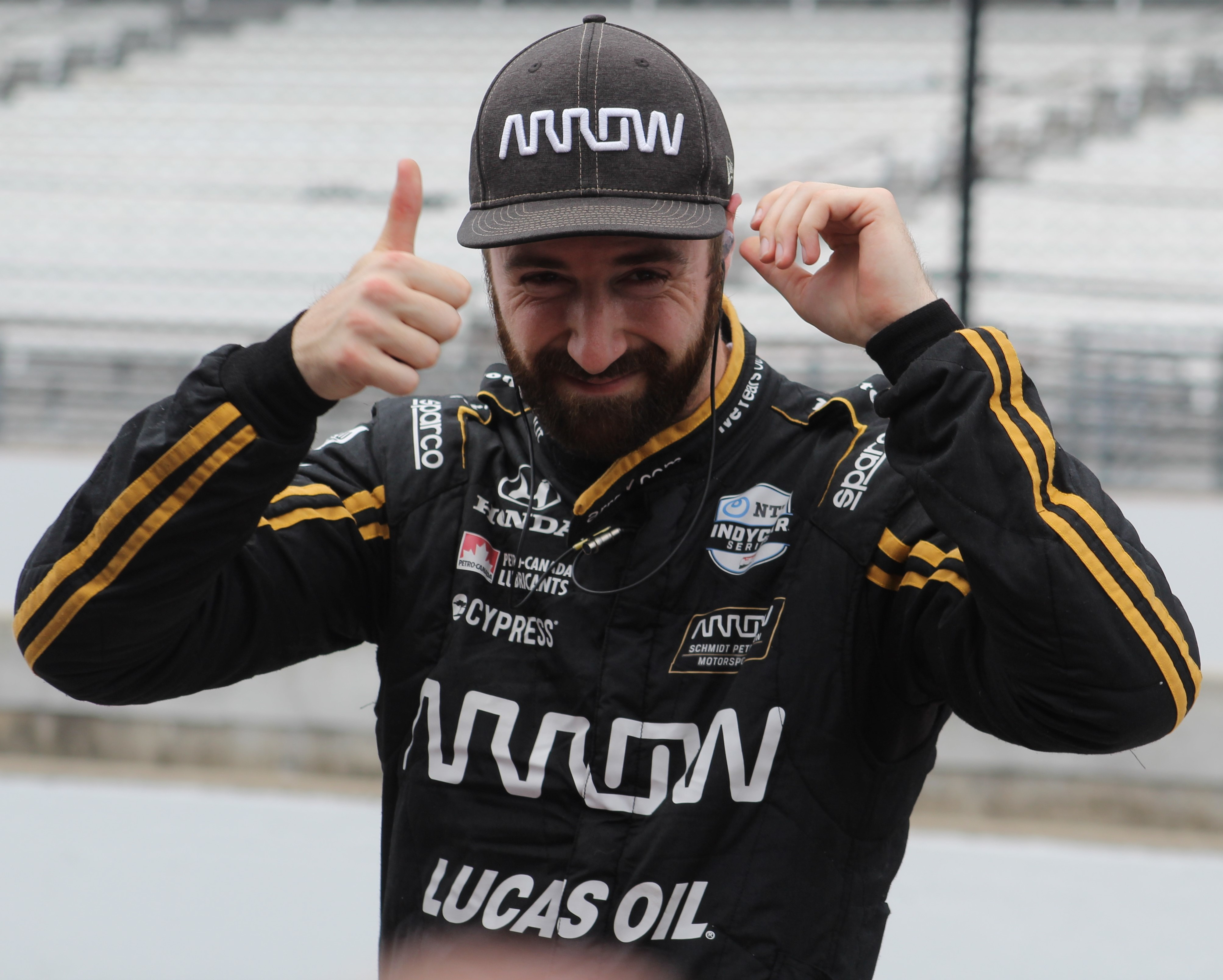 2019 Indianapolis 500